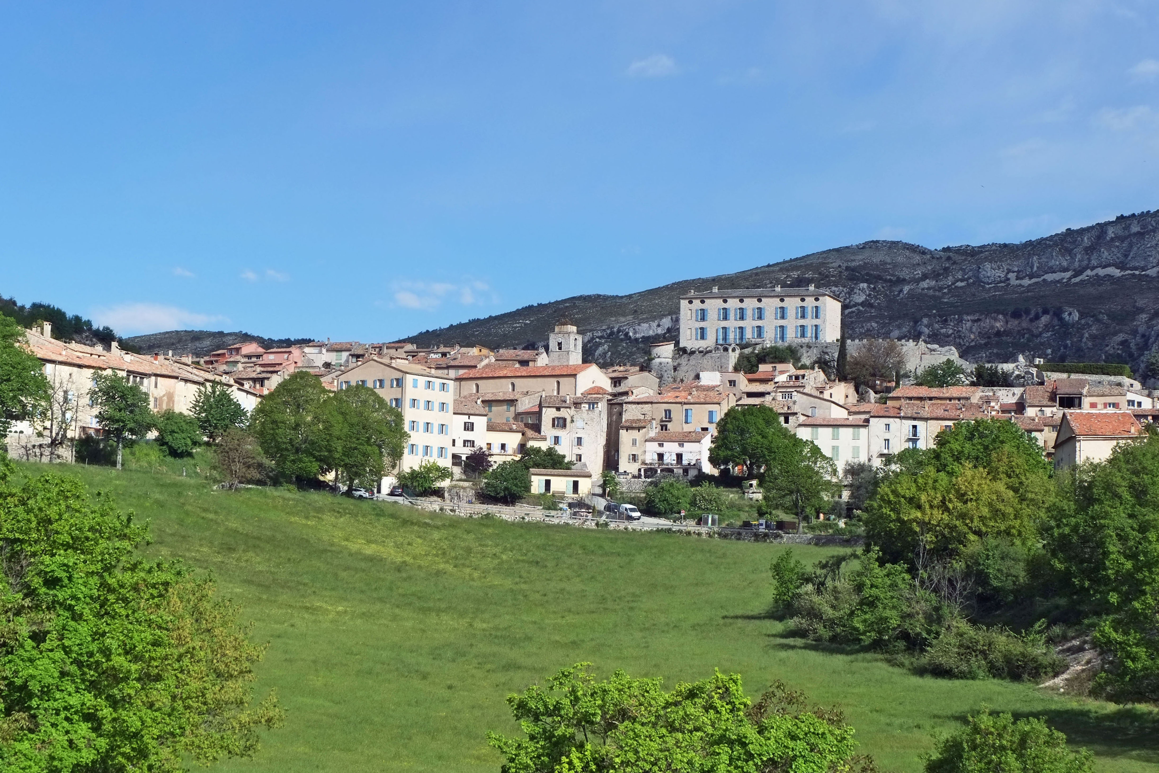 Vue printanière du village de Cipières depuis le chemin de la Sine.